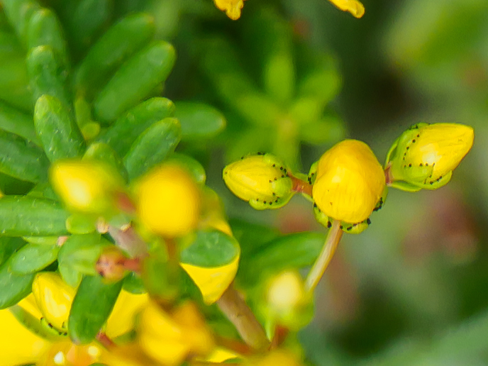 Krähenbeeren Johanniskraut - Hypericum empetrifolium Schwarze Drüsen an Kelchblättern.